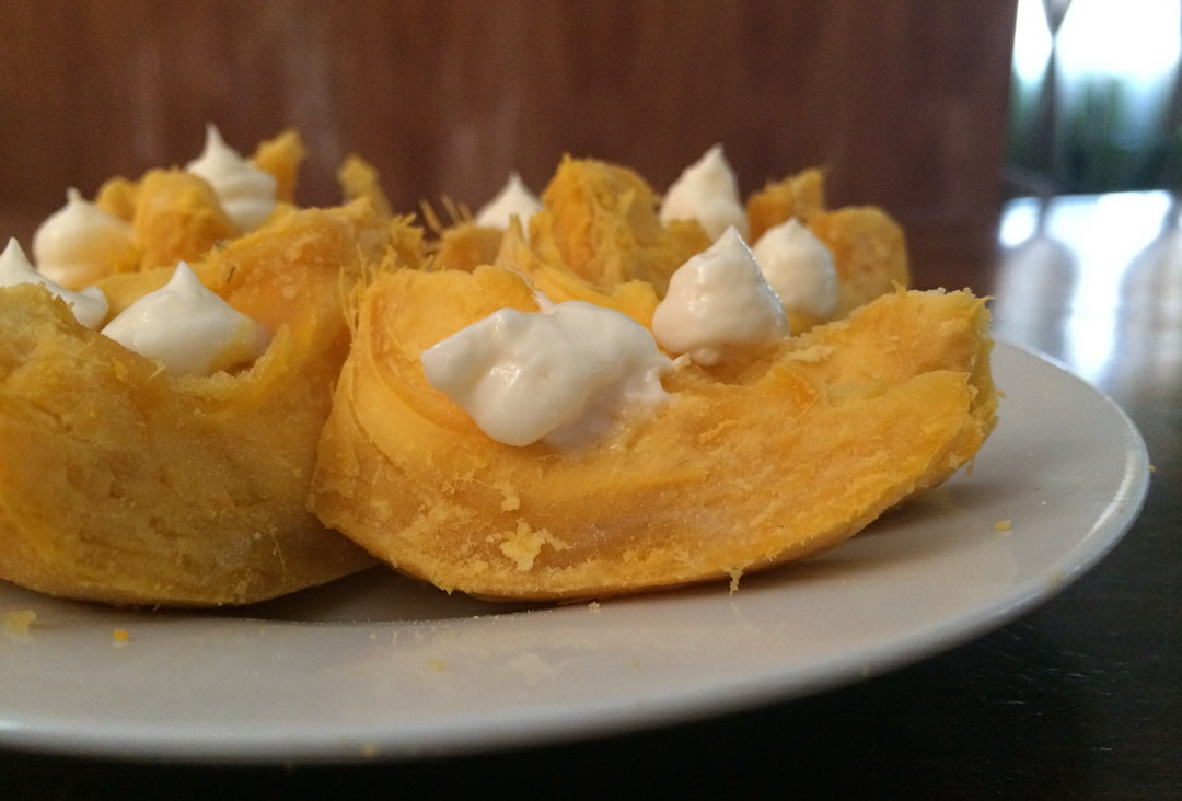 Pejibayes de una feria del agricultor, este fruto procede la palma y se cultiva en Costa Rica desde la época precolombina, suelen acompañarse con mayonesa.